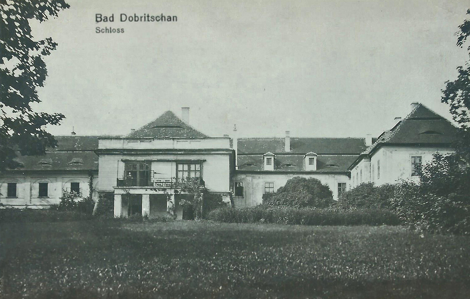 Schloss Dobritschan bei Saaz um 1930 (Gartenseite)